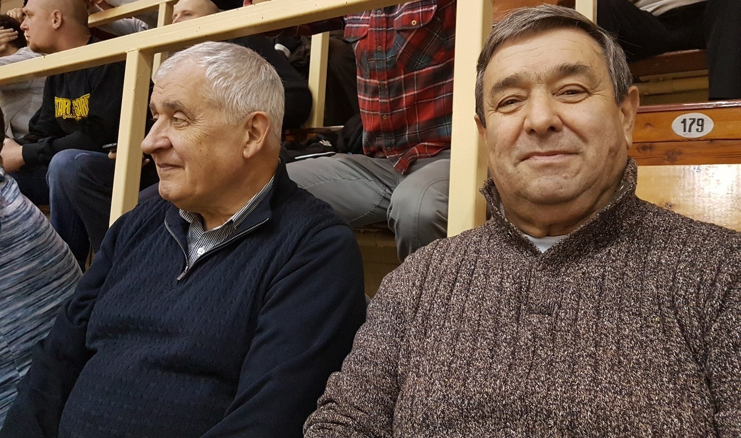 Stargard, 06.12.2017. Kazimierz Nowicki i Stanisław Kopeć